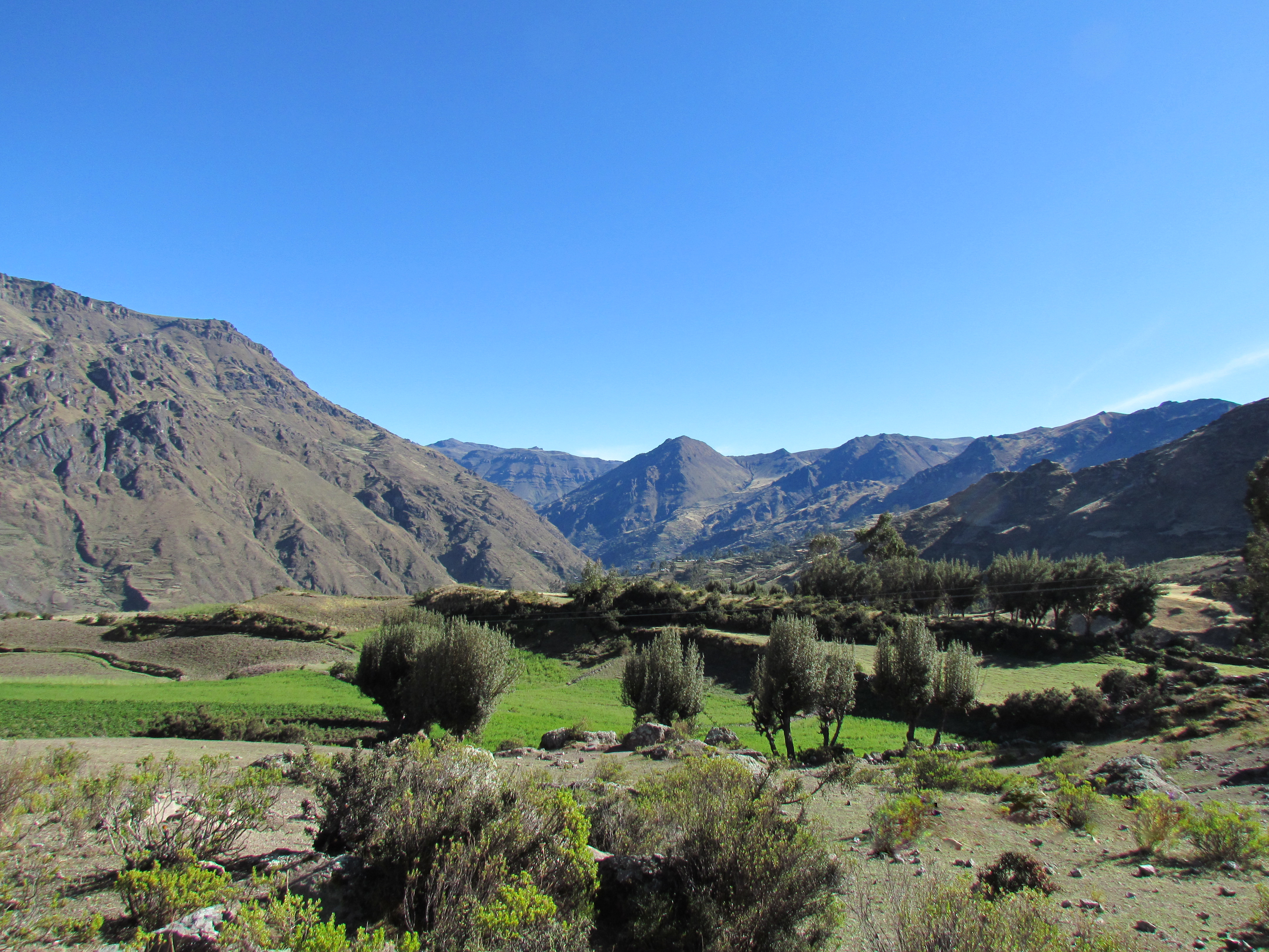 vista parcial de las areas agricolas de AURAHUA